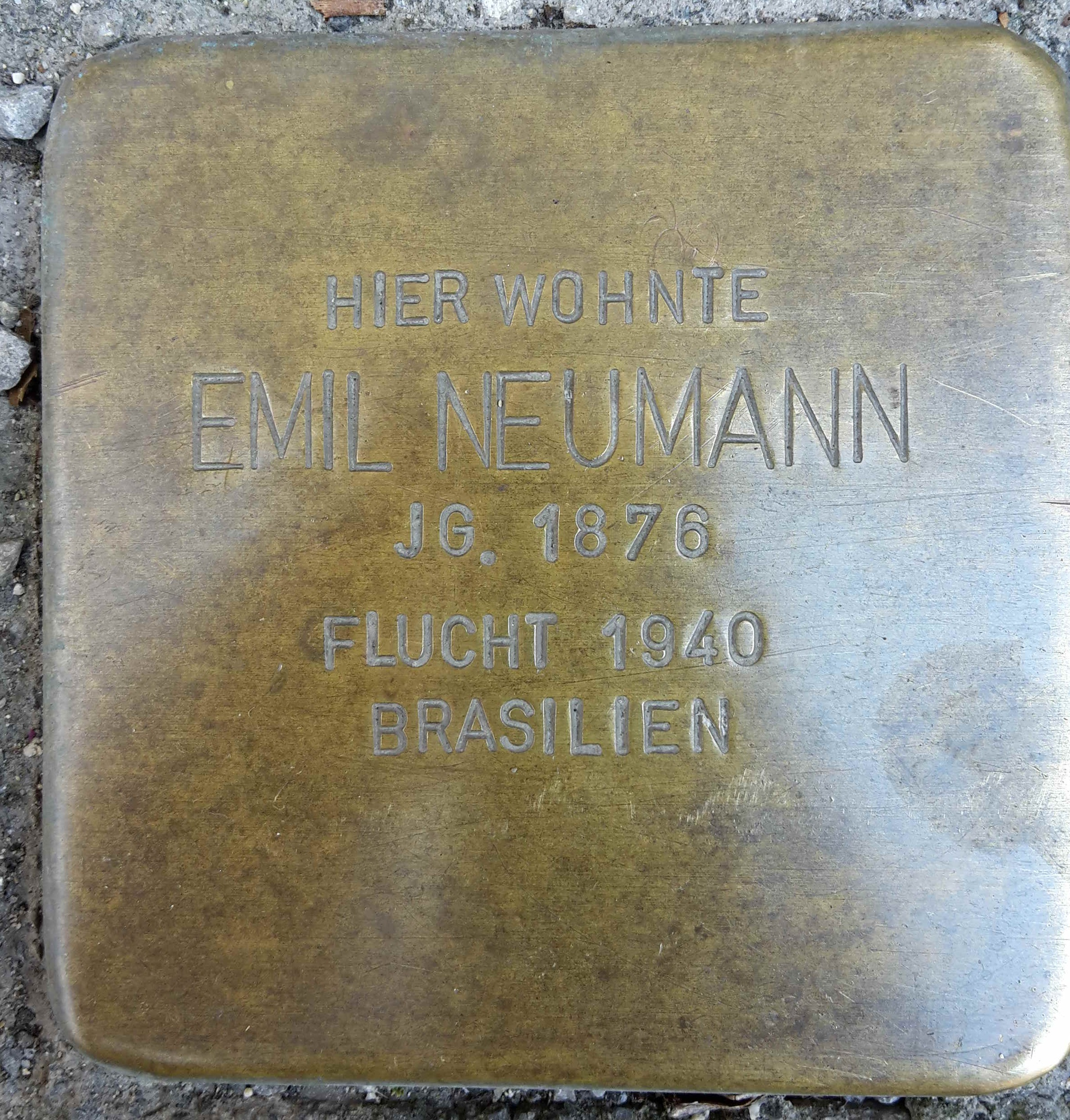 Stolperstein für Emil Neumann